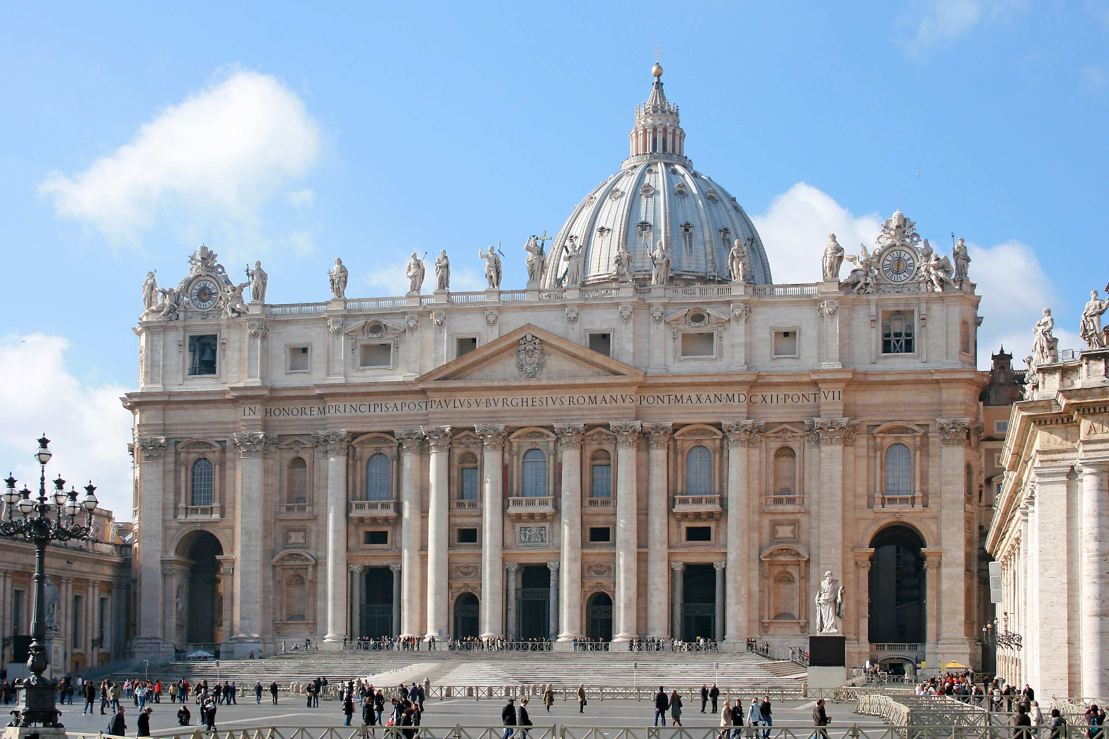 Basilika St. Peter in Rom